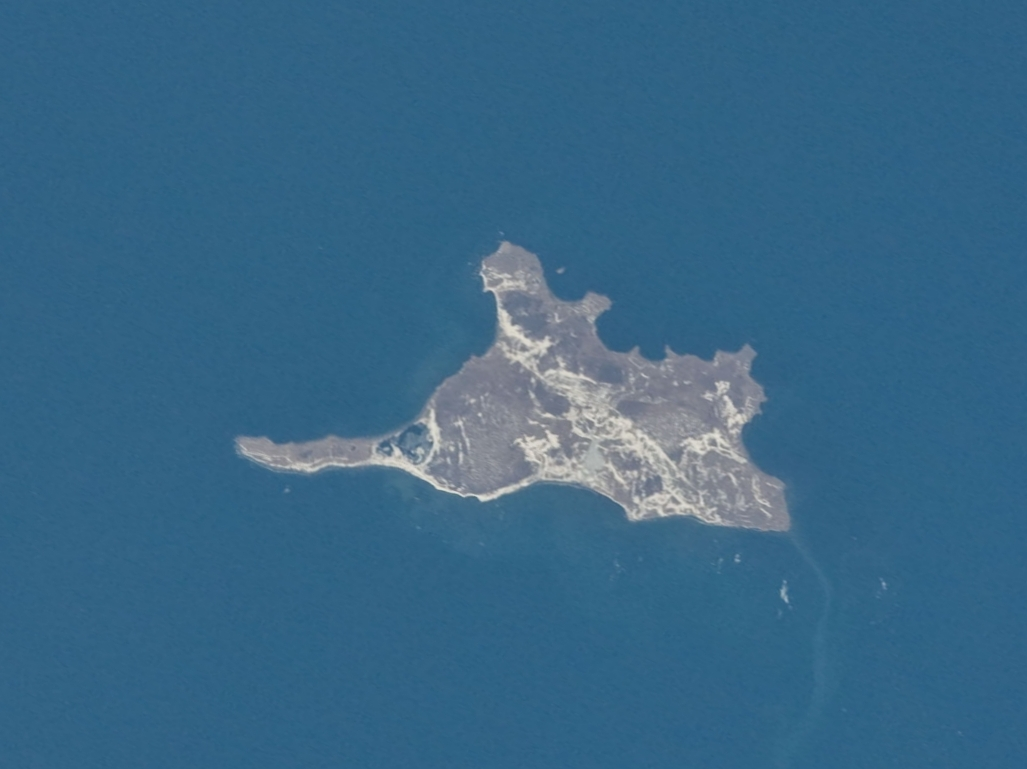 Остров Полонского. Снимок с МКС. Фрагмент